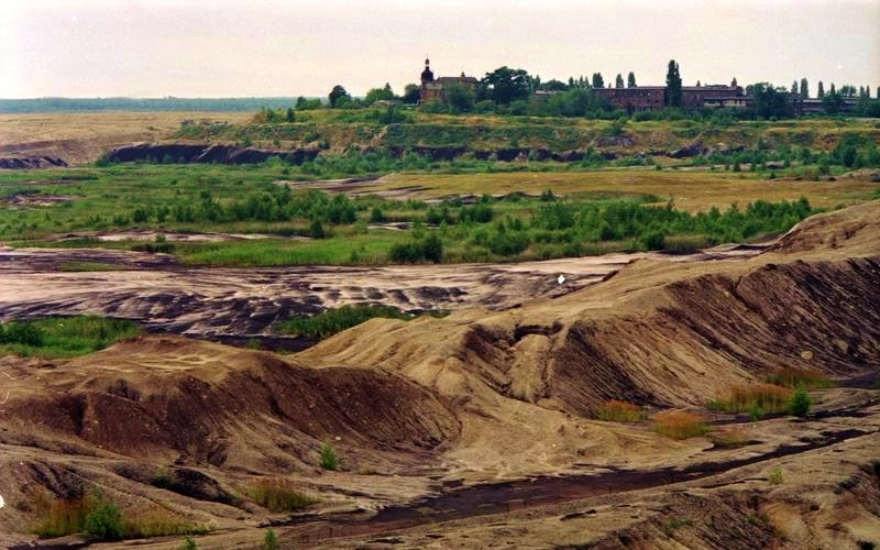 11.-18.8.1991 Bundesland Sachsen-Anhalt, Bitterfeld Tagebaurestlöcher